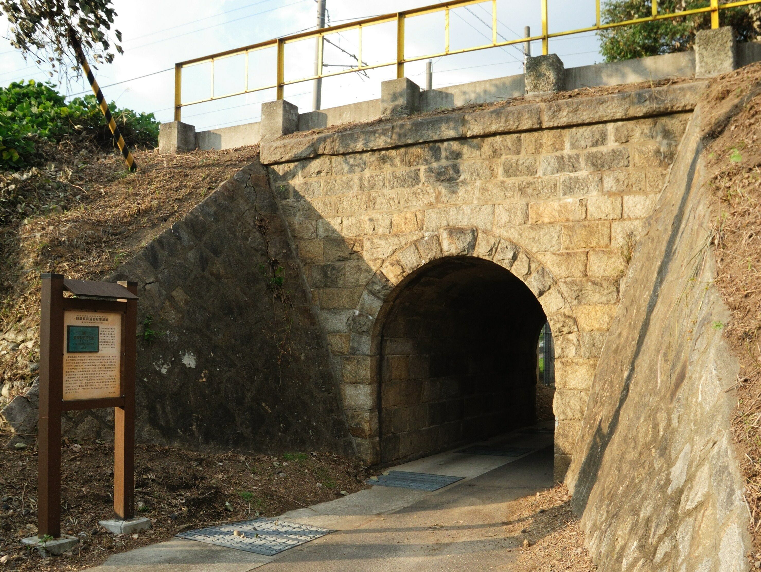 讃岐鉄道岩屋架道橋 - 香川県ja:宇多津町